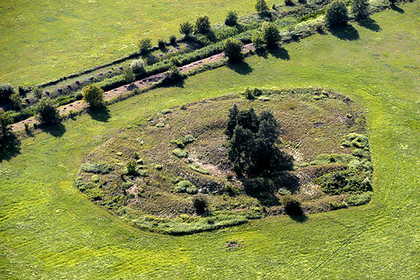 Somogyzsitfa, földvár